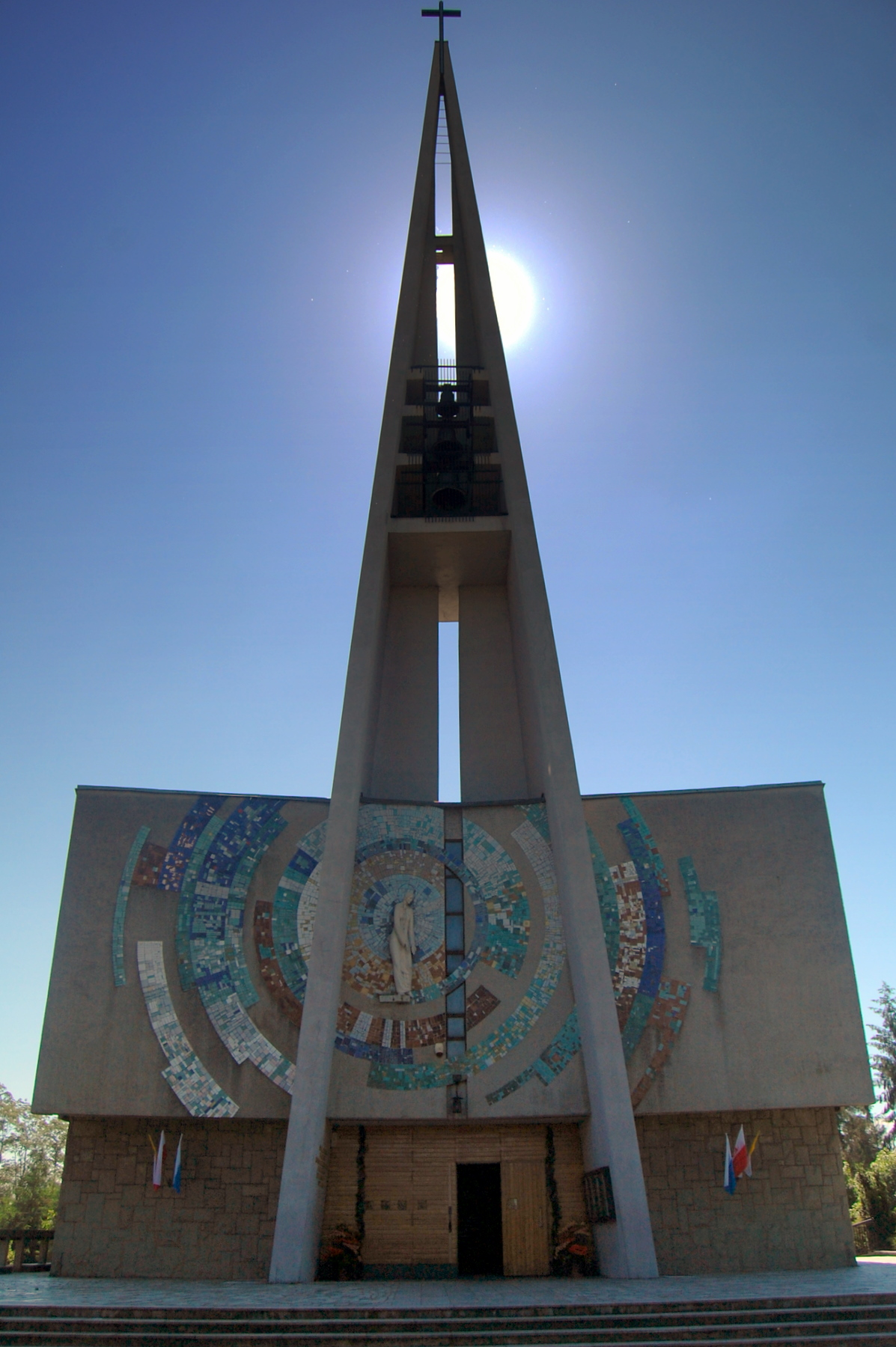 Kostel v Pisarzowicích (Okres Bielsko, Polsko)